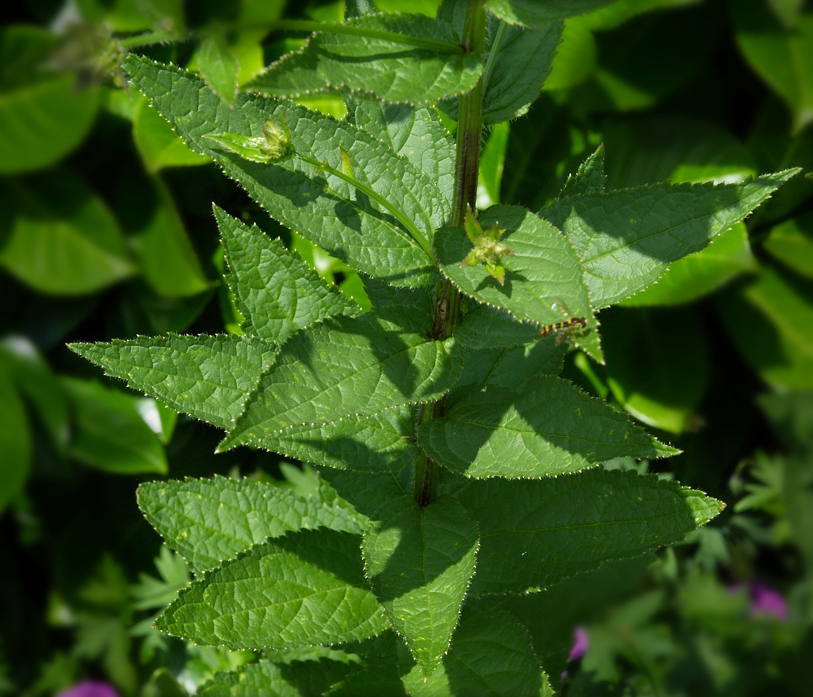 Campanula lactiflora 'Loddon Ann'